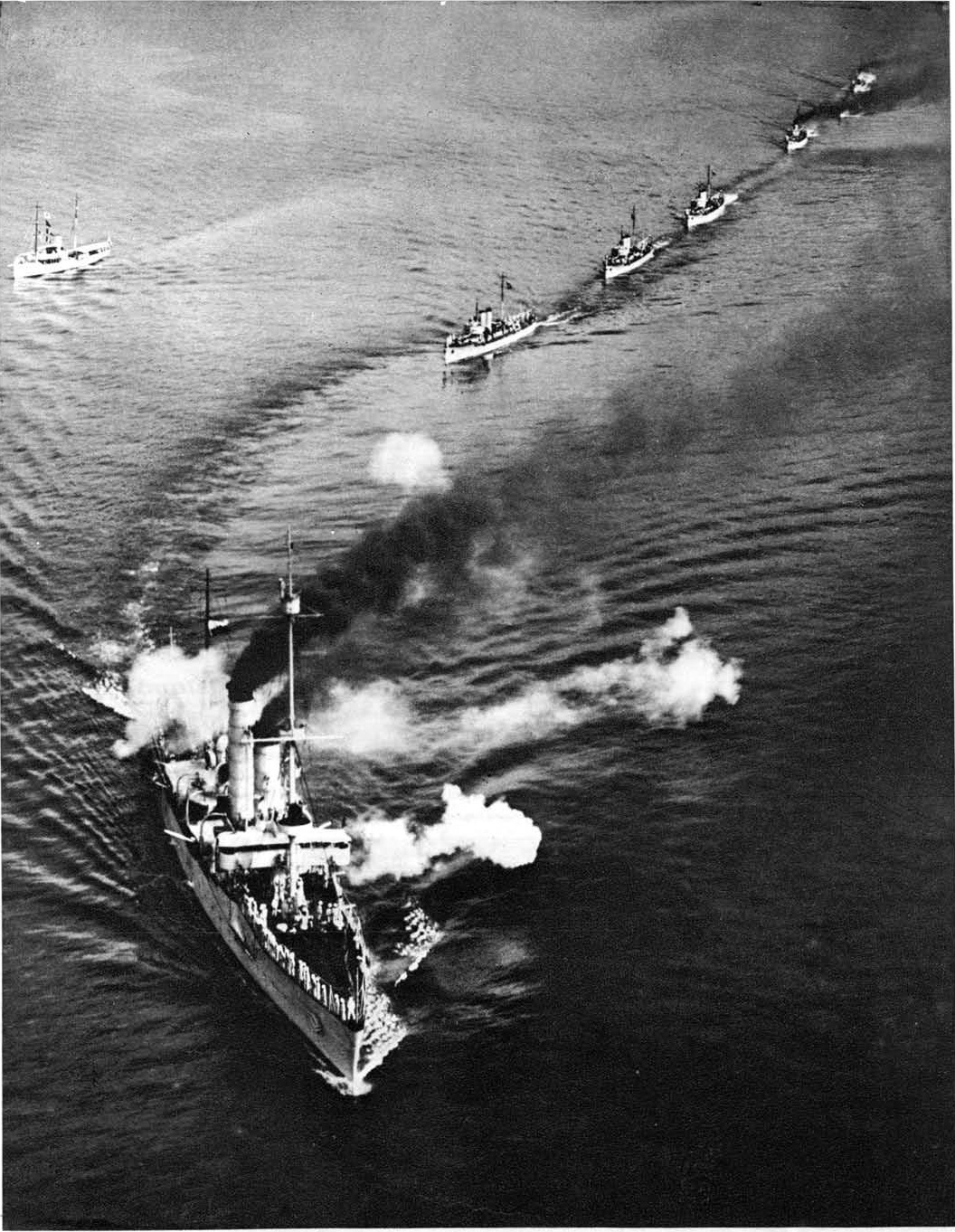 Pogled na našo vojno mornarico, ki zapušča Boko Kotorsko in pluje prvič na službeni poset h grški, francoski in angleški mornarici.